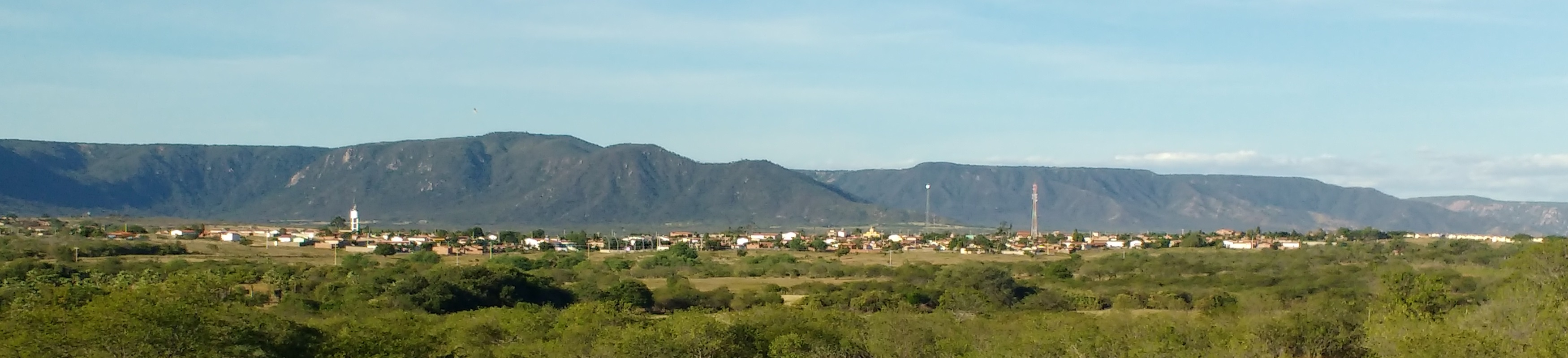 Panorama de Francisco Dantas, Rio Grande do Norte (Brasil), a partir da RN-177 (sentido Pau dos Ferros).